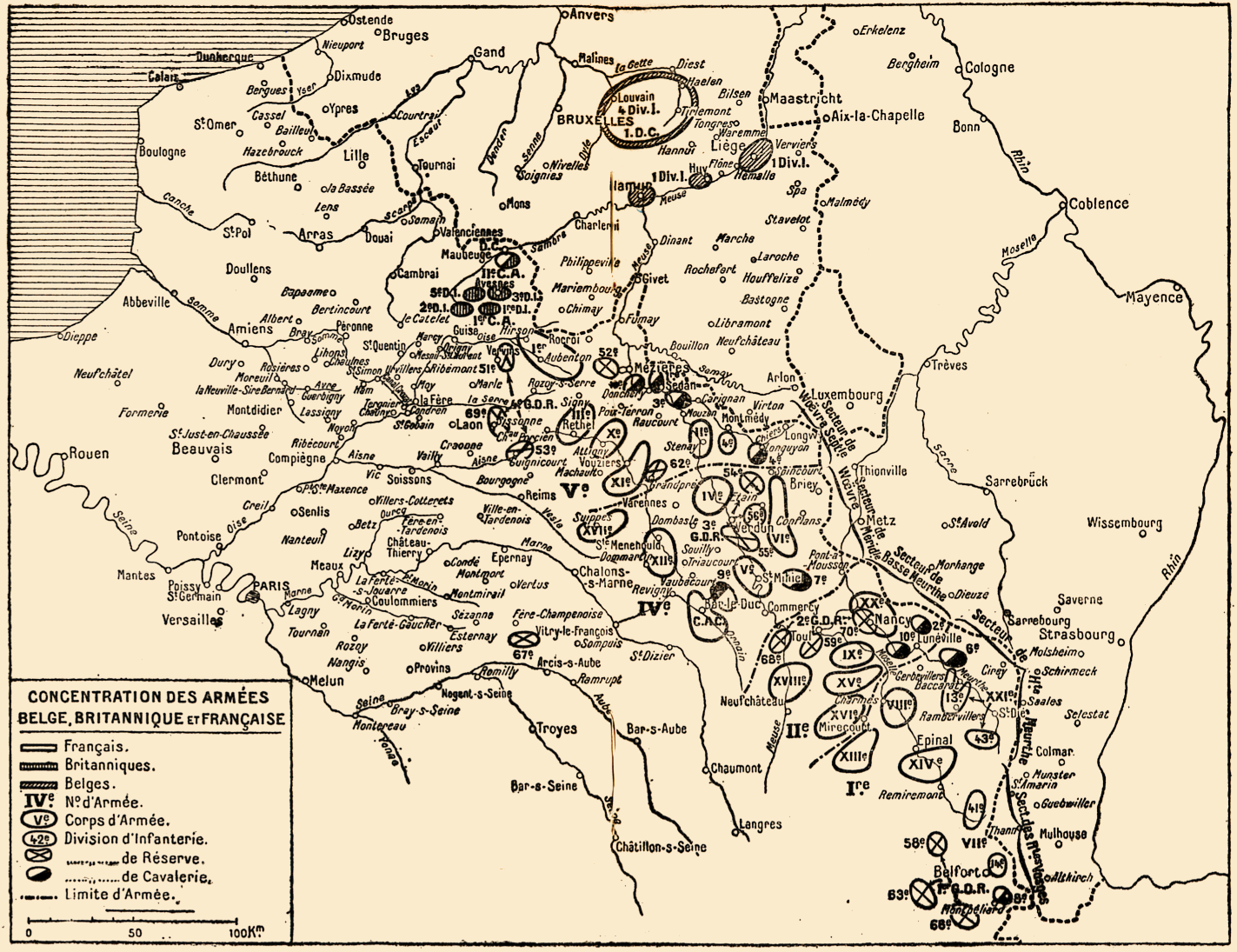 Cartes des zones de concentration des unités des armées belge, françaises et britannique en grands corps, au début de la Première Guerre mondiale (août 1914), d’après les informations du GQG français. Tirées des mémoires du maréchal Joffre, publiées à titre posthume. Référence complète : Joseph Joffre, Mémoires du Maréchal Joffre (1910-1917), tome premier, Paris : Librairie Plon, 1932